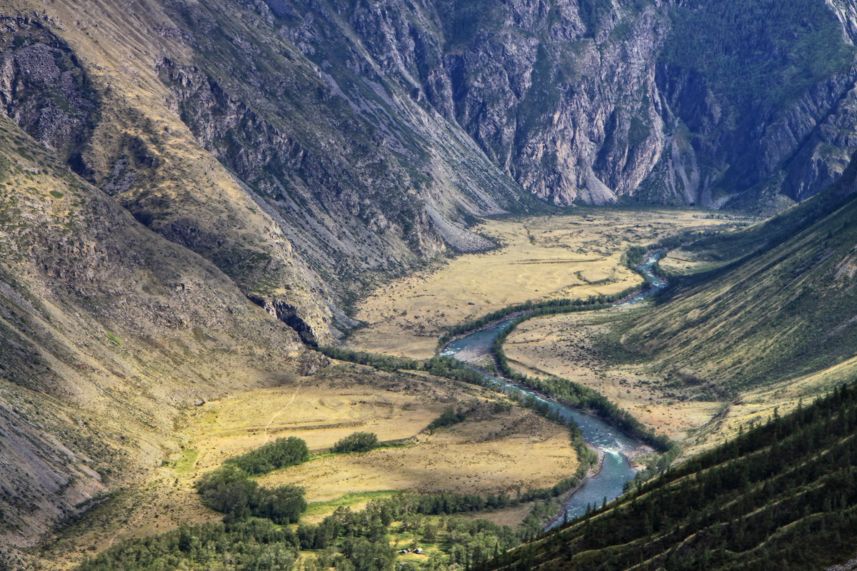 Ак Чолушпа - кластер Чулышман: Улаганский район, Алтай This image is related to the protected area of Russia number 0410063